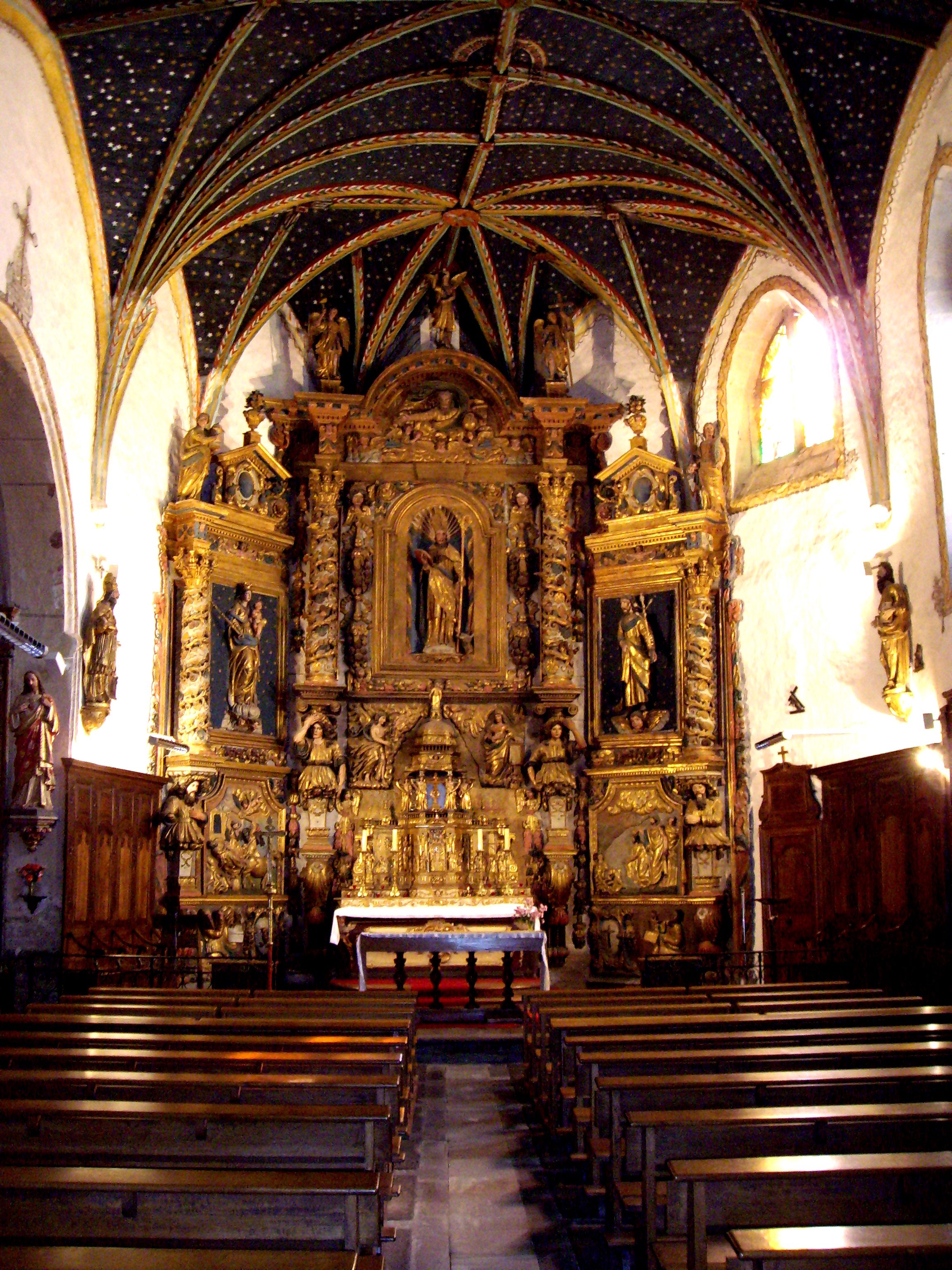 Retable attribué à Jean I Ferrère et Elie Corau